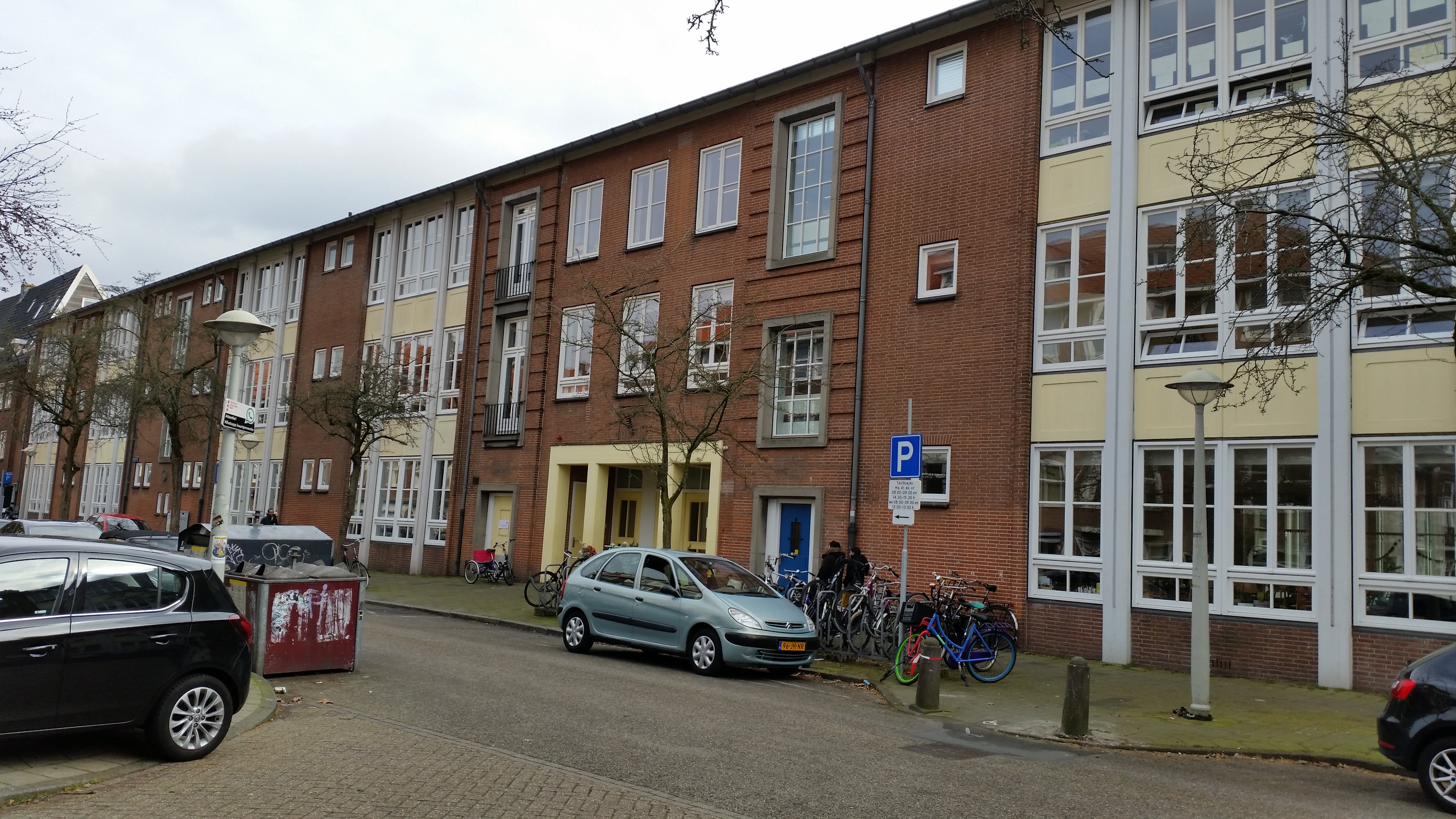 Rietwijkerstraat 55-77, Amsterdam